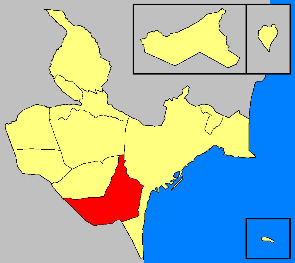 Entidades de población del término municipal de Alicante